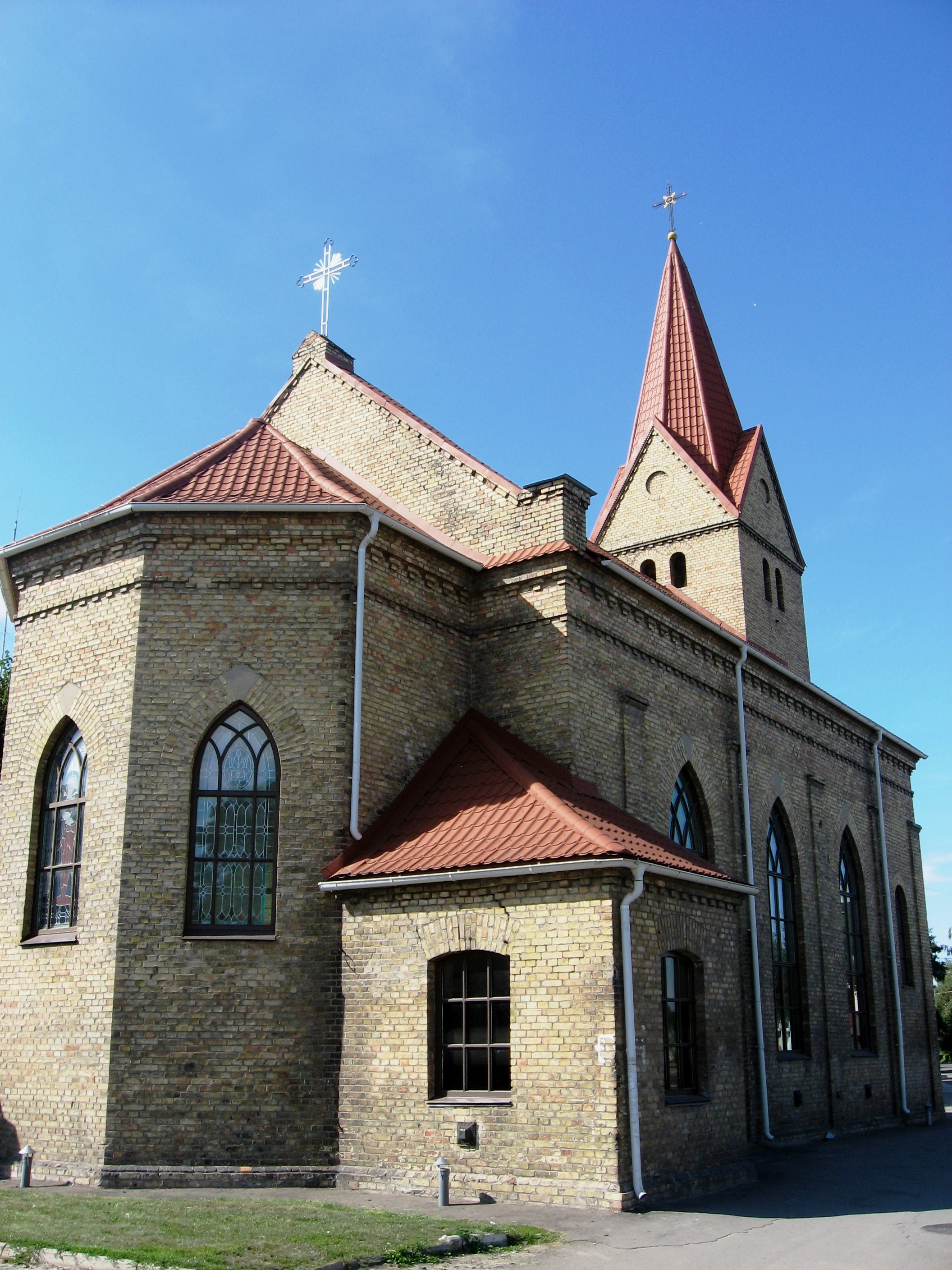 Володимир-Волинський. Лютеранська кірха